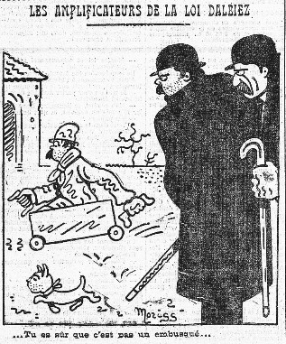 Embusqués L'humanité du 6 12 15